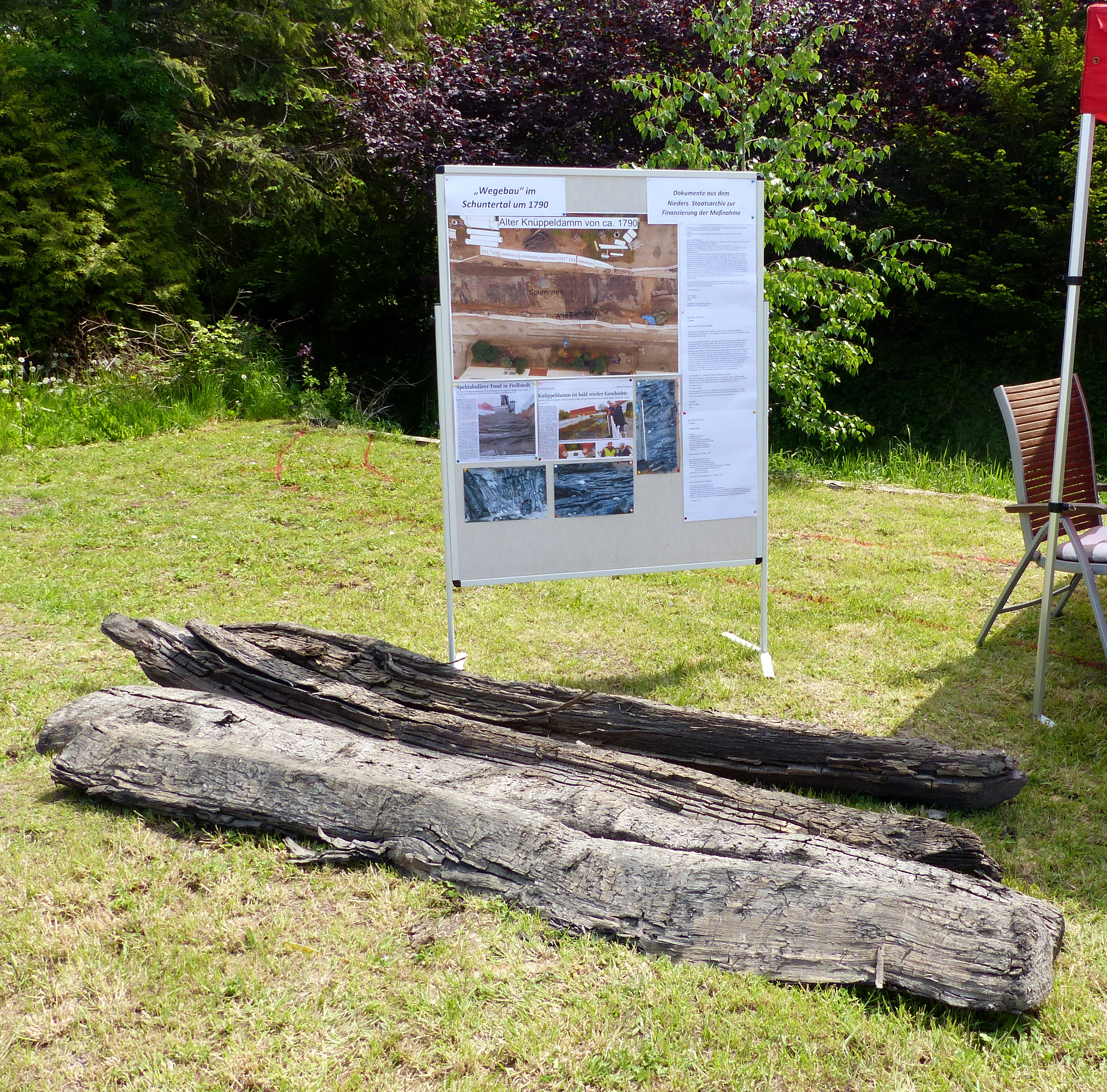 Dokumentation der Funde des Knüppeldamms in Frellstedt aus dem 18. Jahrhundert anlässlich der Schunter-Gewässerwoche 2019